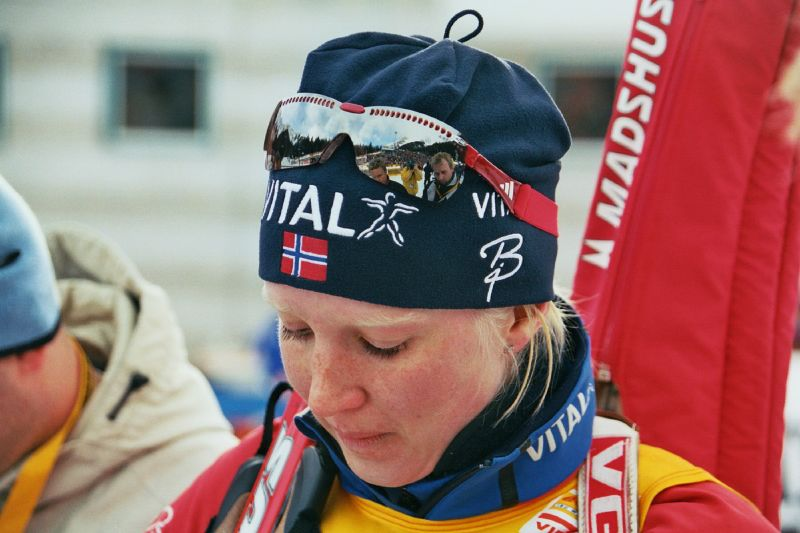 Linda Grubben, Norway